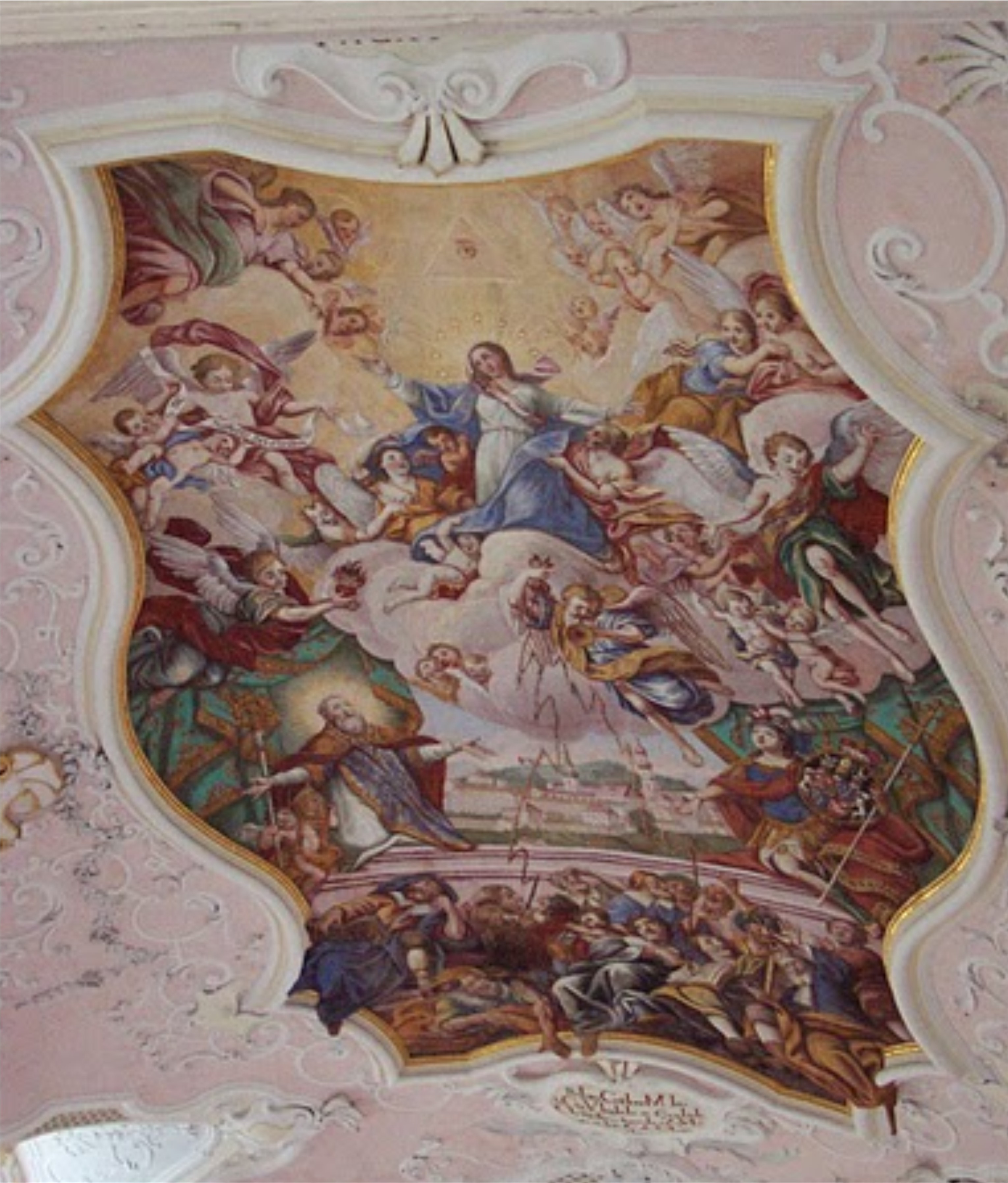 „Verherrlichung“ der Protestantenvertreibung aus dem Stift Berchtesgaden durch Fürstpropst Cajetan Anton Notthafft von Weißenstein, Deckenfresko in der Maria Kunterweg-Kapelle.